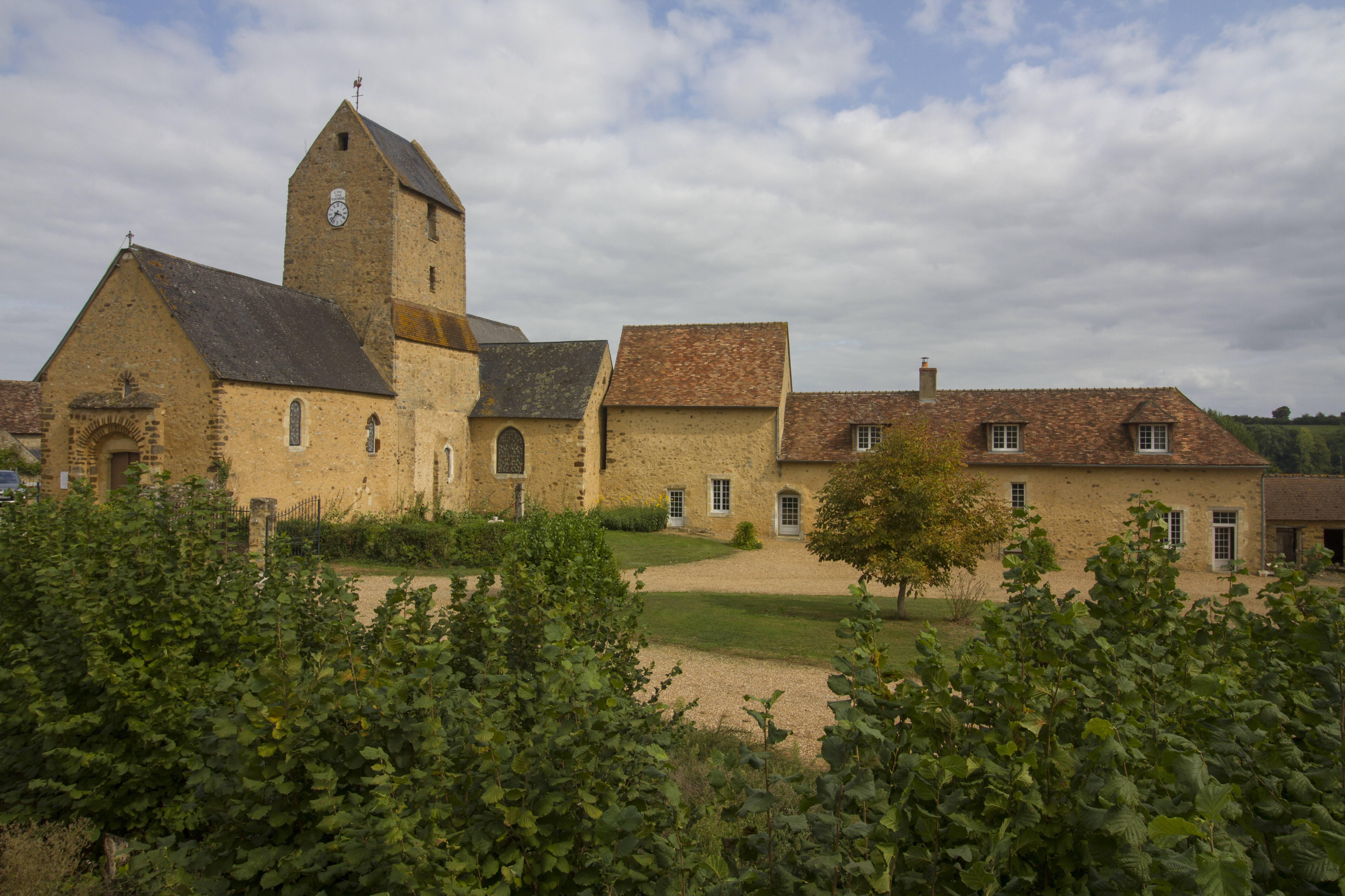 Eglise de Mareil-en-Champagne - Sarthe